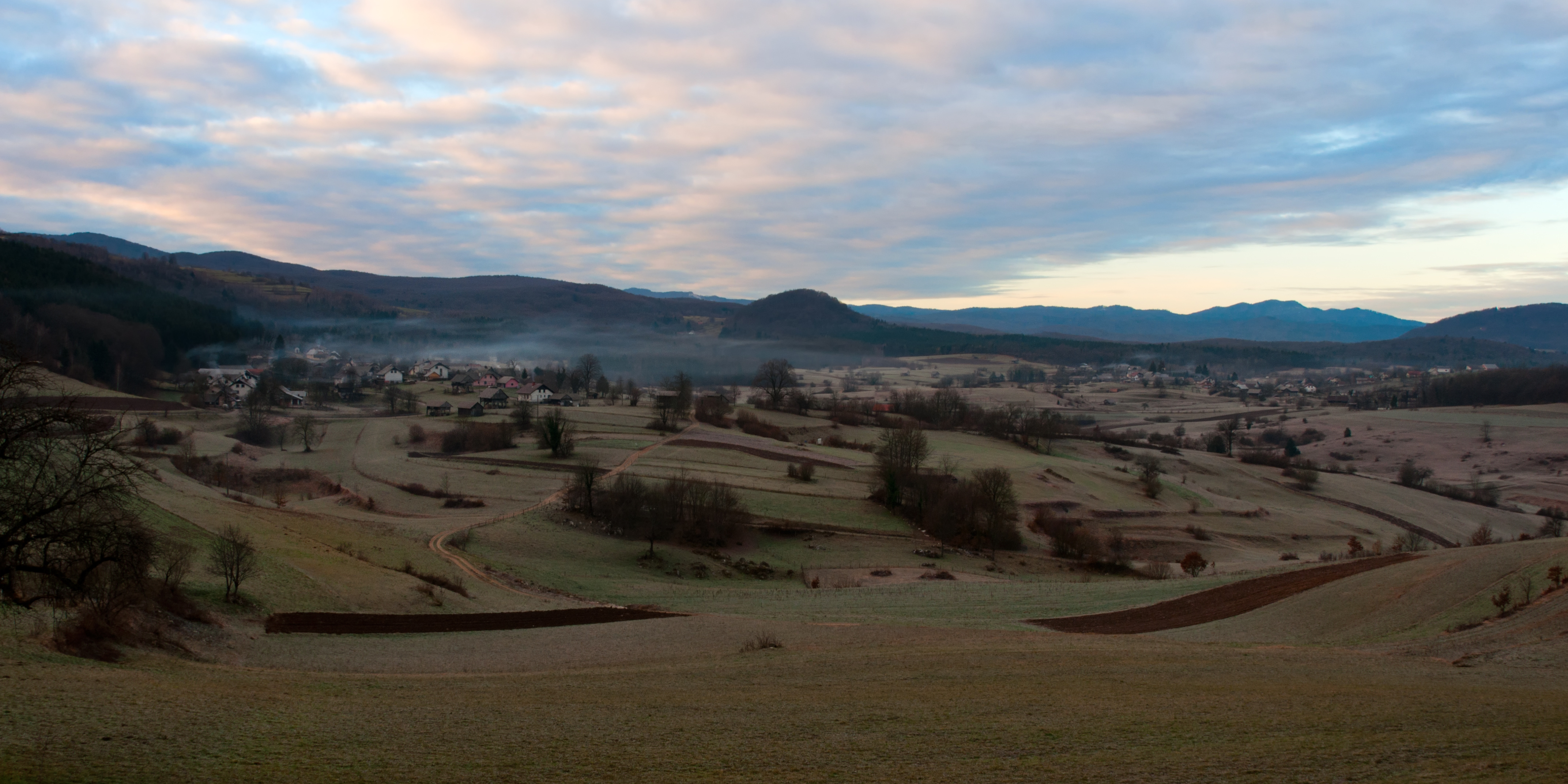 Koroška vas (levo) in Jurna vas (desno).